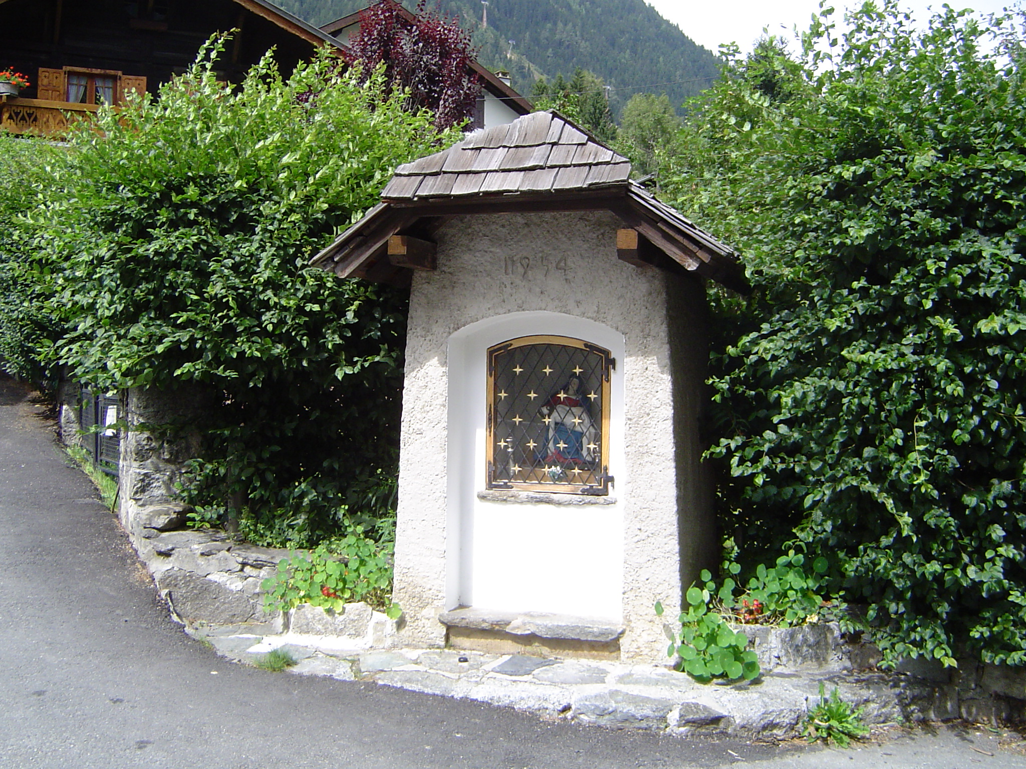 Photos prises dans la commune de Chamonix-Mont-Blanc